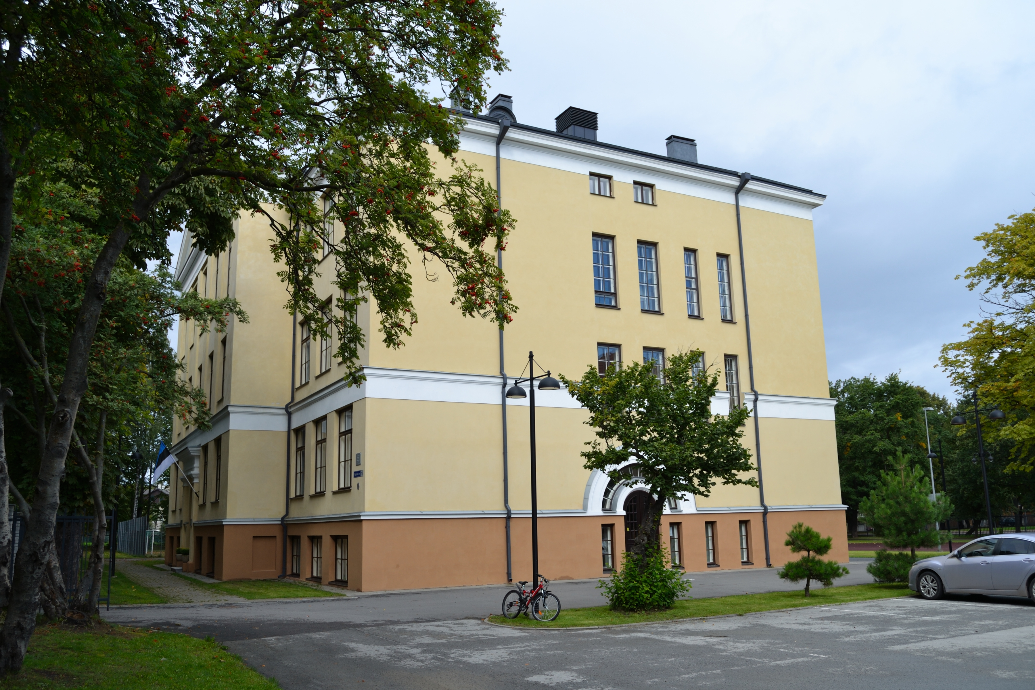 Tallinn, koolihoone Vabriku 18, 1913